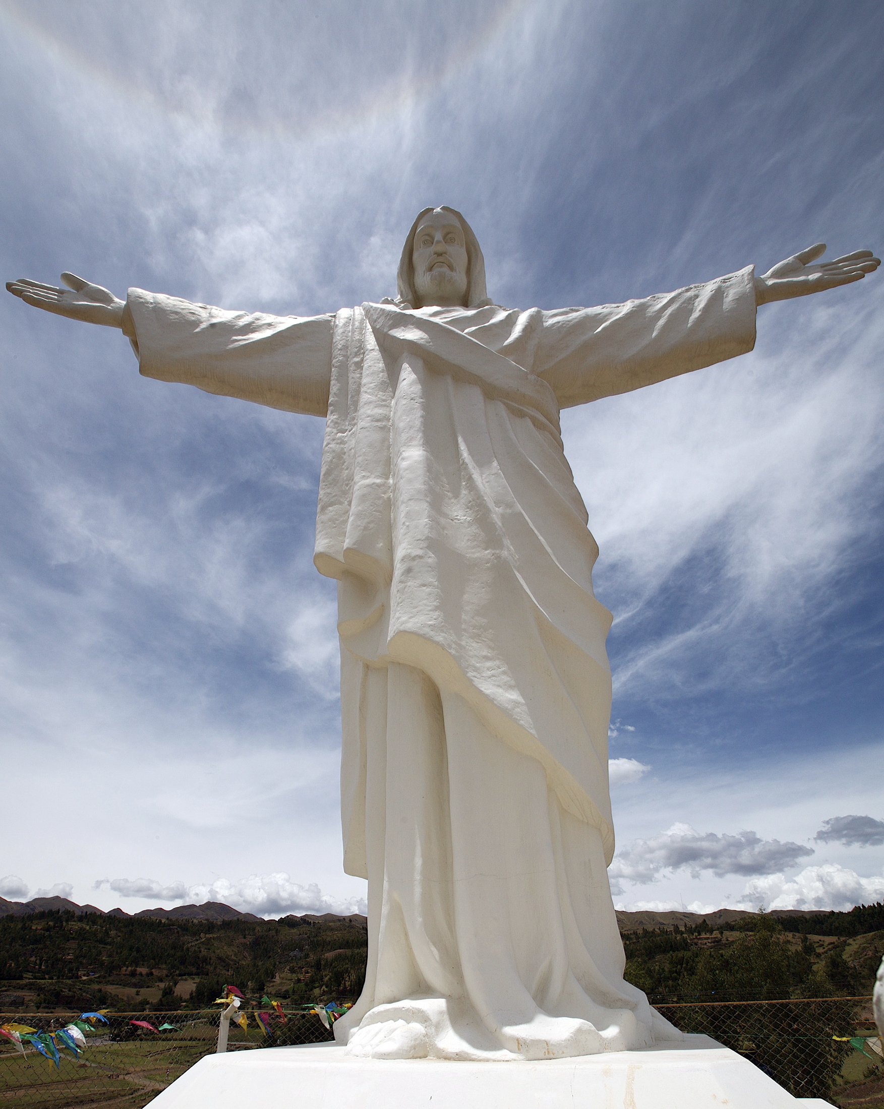 Cristo Blanco statue in Cuzco, Peru.